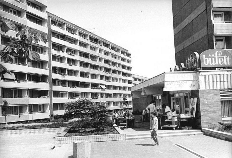 Cottbus, Sachsendorf, Wohnhaus ADN Weisflog -12.6.90 Cottbus: Terroristin Albrecht In diesem Wohnhaus im Neubaugebiet Sachsendorf-Madlow wohnte Susanne Albrecht alias Ingrid Jäger von 1980 bis Anfang 1985. Abgebildete Personen: Albrecht, Susanne: Mitglied der Rote Armee Fraktion, Englischlehrerin, Bundesrepublik Deutschland